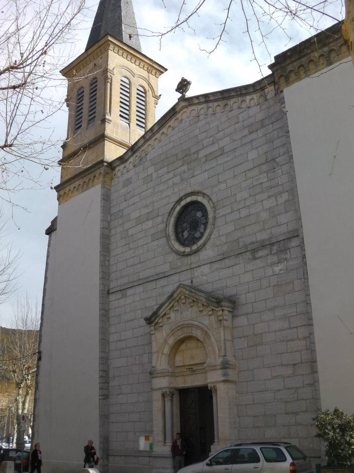 Eglise Saint-Hippolyte de Saint-Hippolyte du Fort (Gard, France)